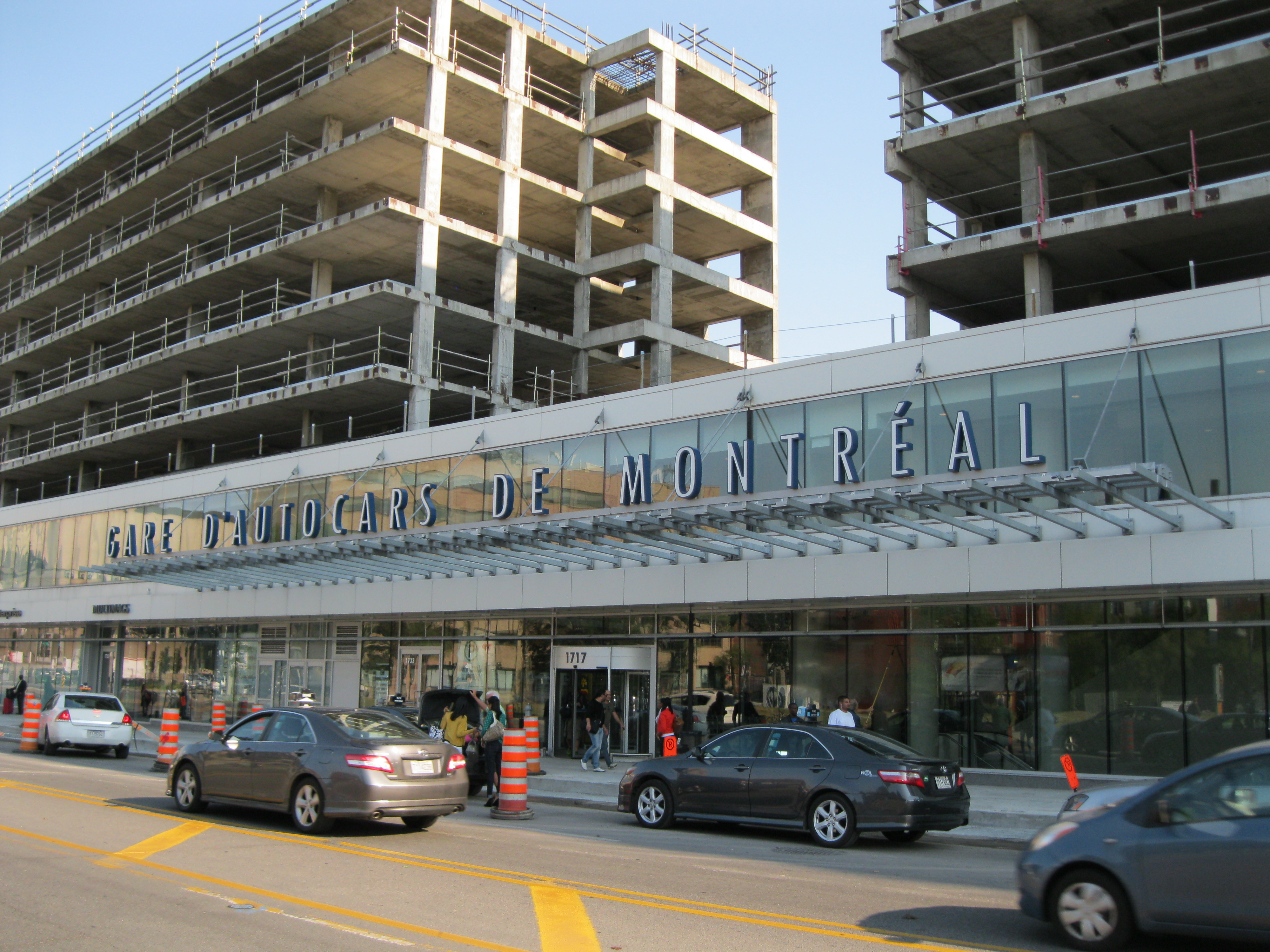 Gare d'autocars de Montréal, 1717, rue Berri